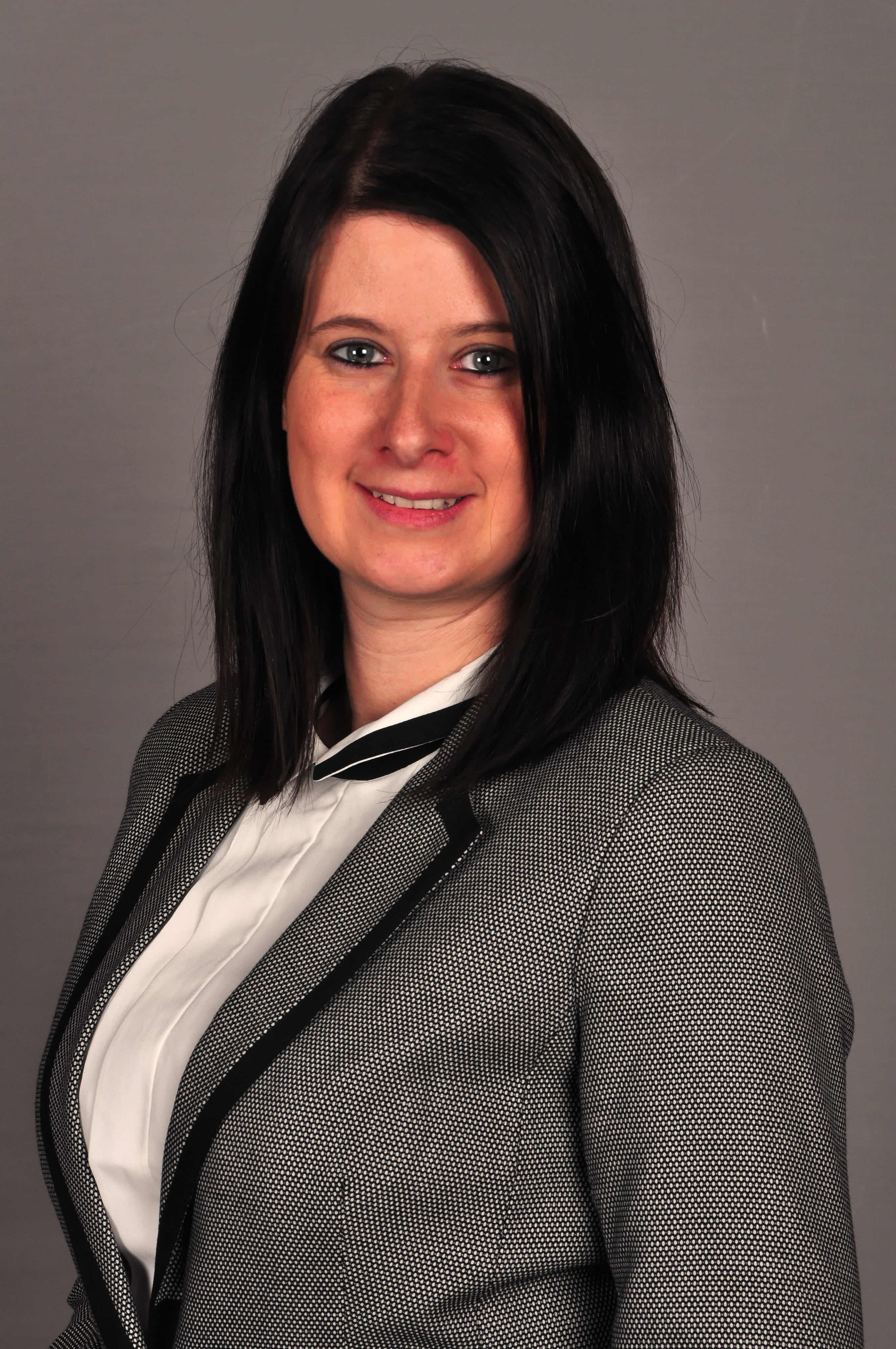 Ann Christin von Allwörden, MdL Mecklenburg-Vorpommern